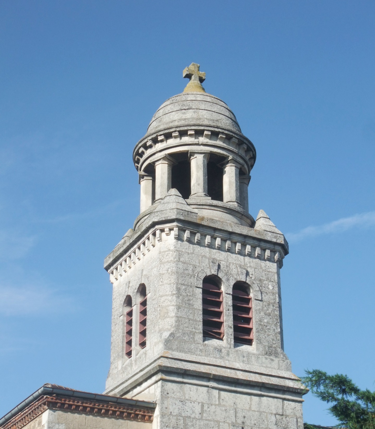 Talencieux église clocher